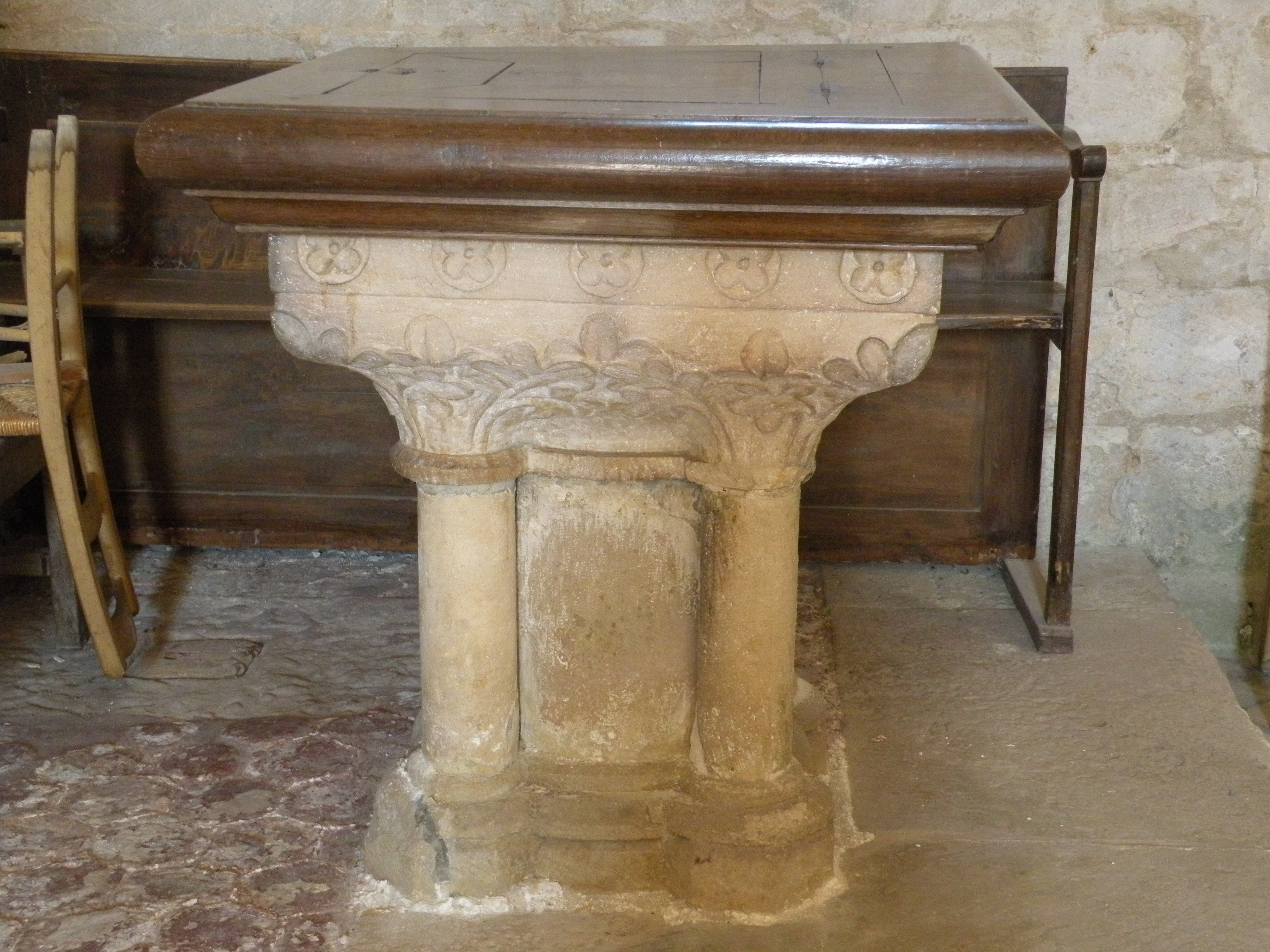 Église de la Nativité-de-Notre-Dame de Lavilletertre : Fonts baptismaux de la première moitié du XIIIe siècle.